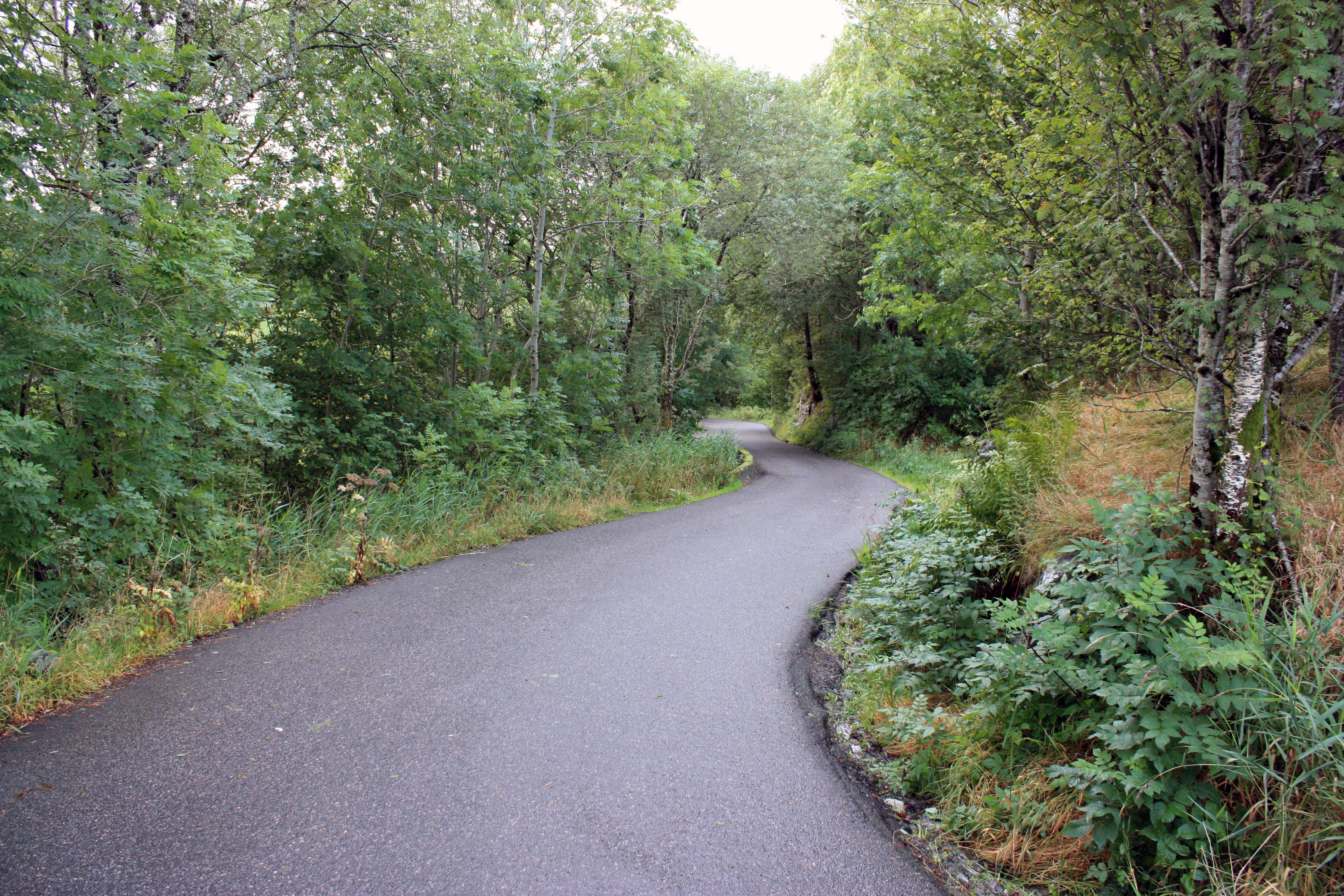 Nøttveitvegen, Fana, Bergen.